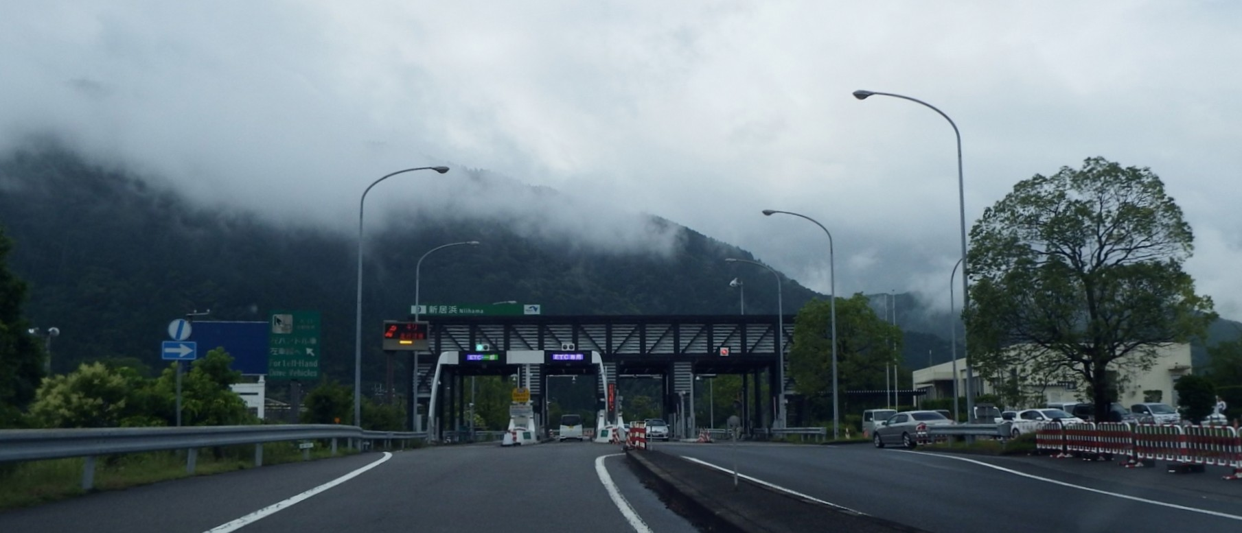 新居浜インターチェンジ入口